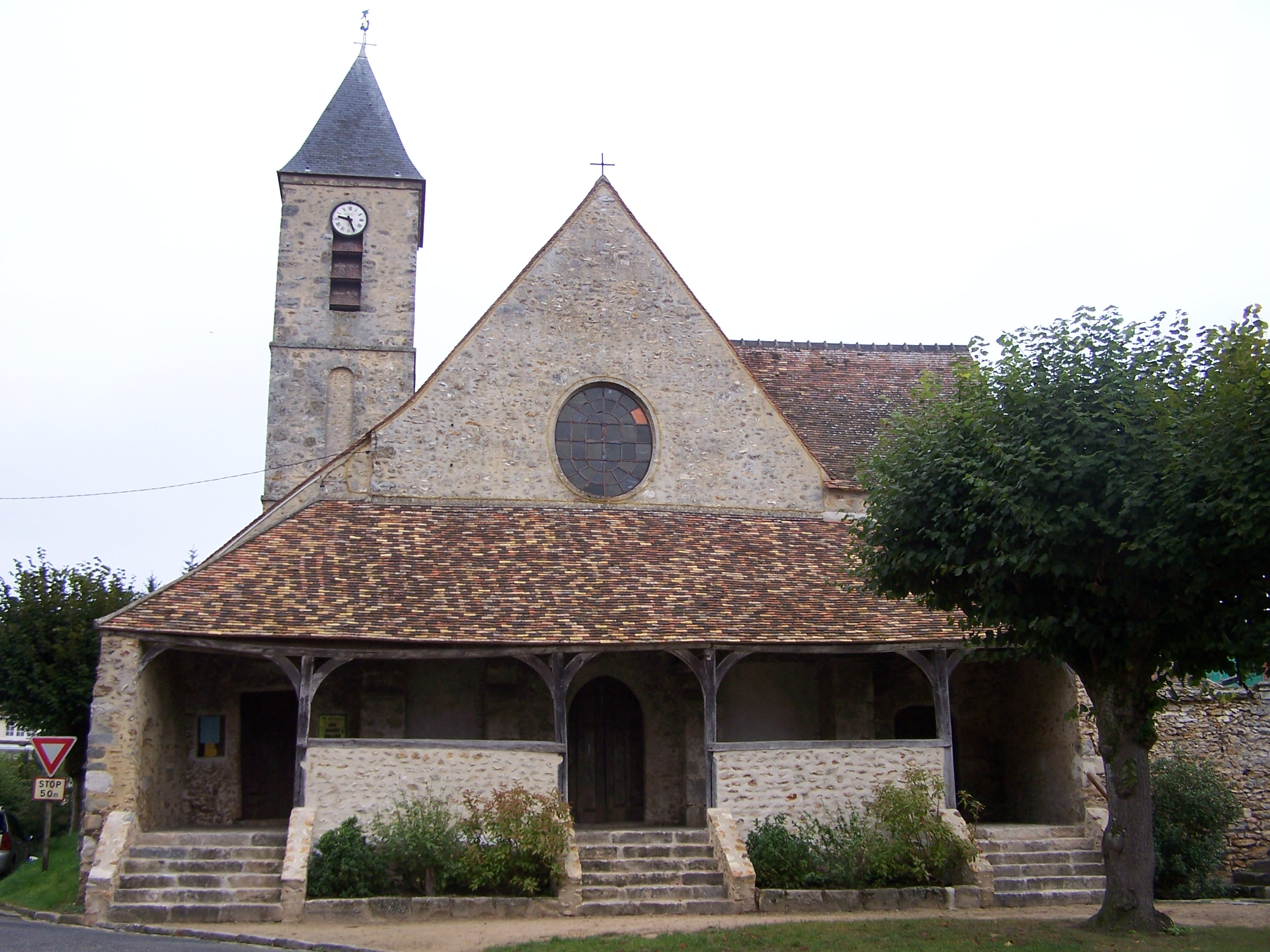 Église de Bullion (Yvelines, France)